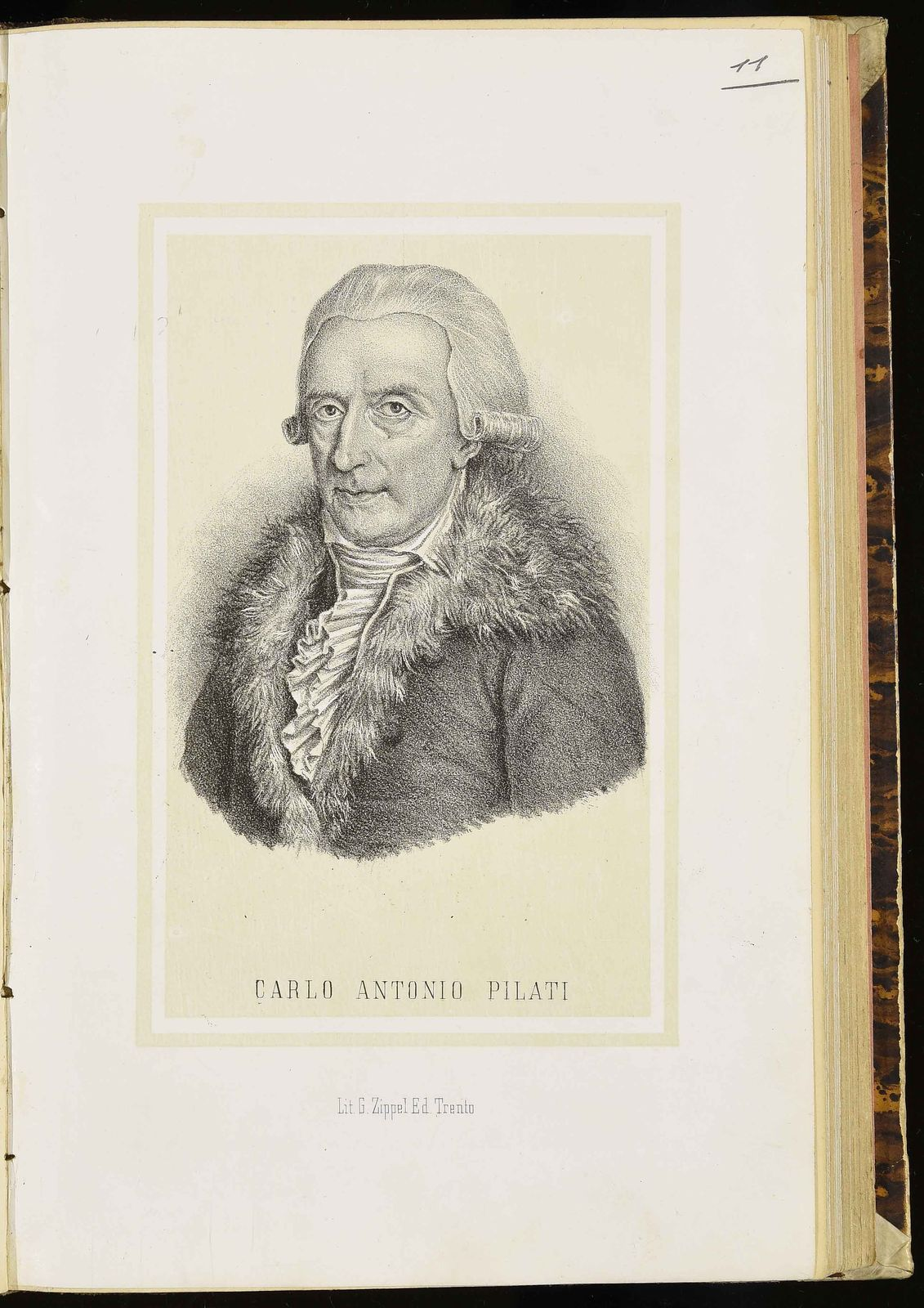 Litografia; 206x134 mm, in Francesco Ambrosi, Scrittori ed artisti trentini, Trento, Giovanni Zippel, 1883. Da Biblioteca Digitale Trentina.